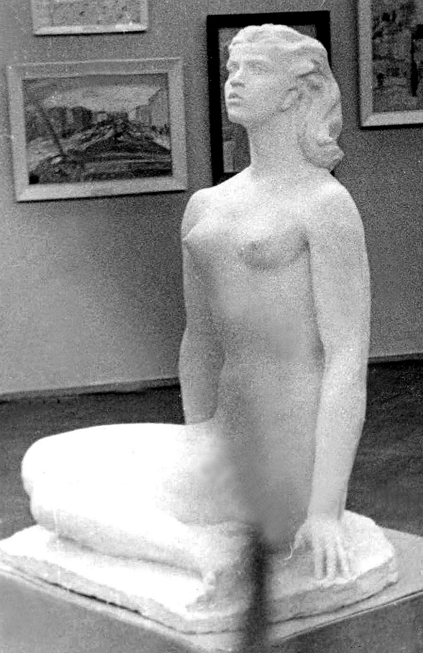 скульптура Г.А.Шульца "Весна". Гипс (фото Алексея М.Шульца)